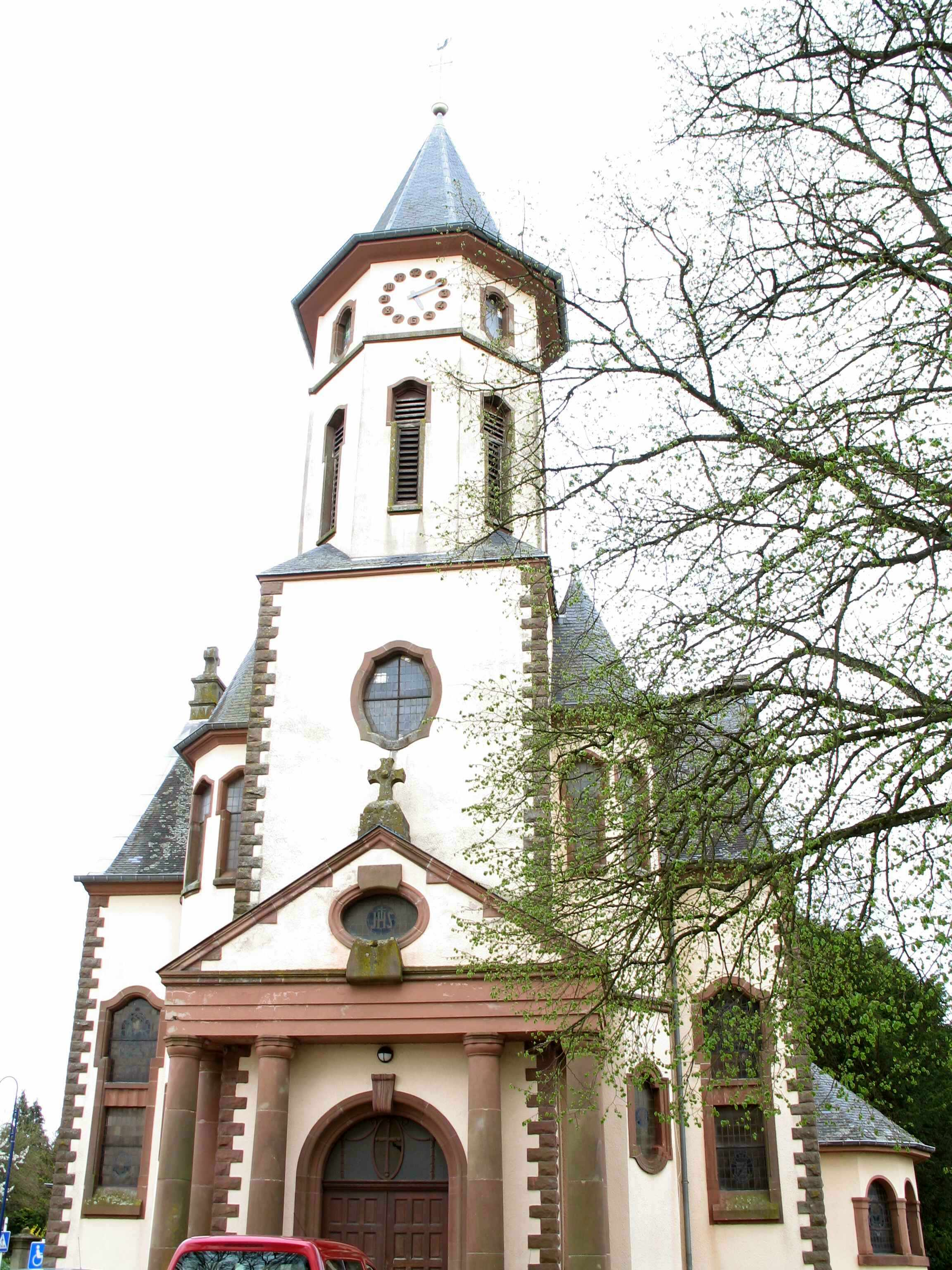 L'église de Redange (Luxembourg)